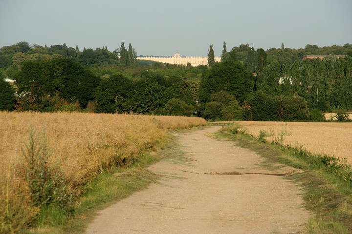 L'Allée Royale de Villepreux. Vue du château de Versailles depuis la commune de Fontenay-le-Fleury, dans la plaine de Versailles.